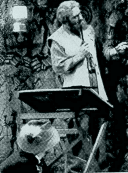 Cena do filme One Million B. C. (1940)